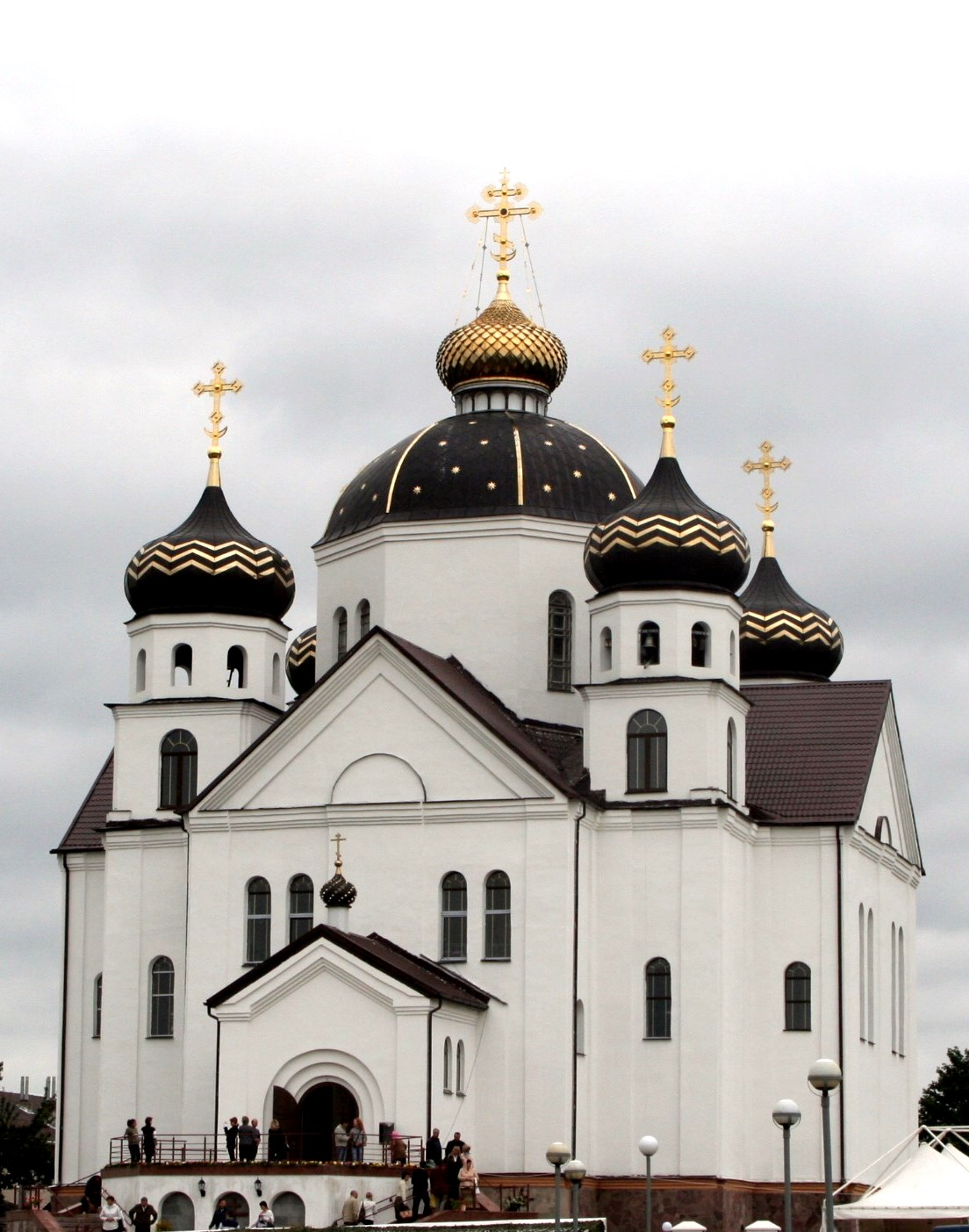 Сморгонь. Православная Церковь Преображения Господня. Беларуская (тарашкевіца): Смаргонь, царква Перамяненьня Гасподняга